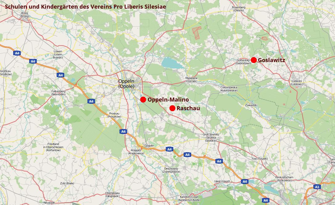 Die zweisprachigen (deutsch und polnisch) Kindergärten und Schulen des Vereins "Pro Liberis Silesiae" der Deutschen Minderheit in der Woiwodschaft Oppeln.